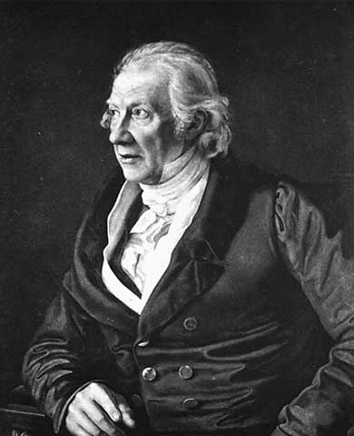 Depicted person: Carl Friedrich Zelter